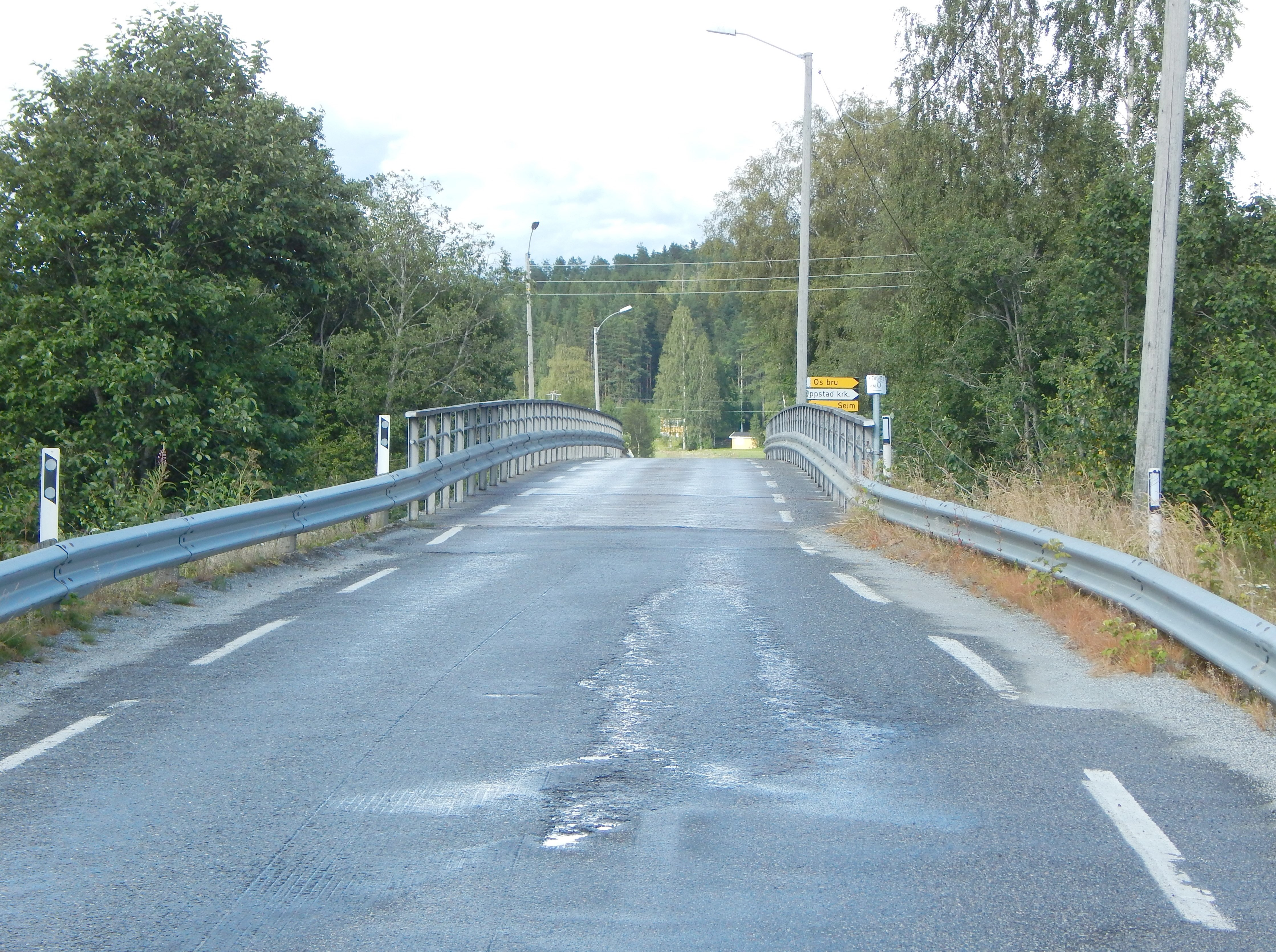 Vikervegen (fylkesvei 1940, tidl. 285) på Oppstad bru